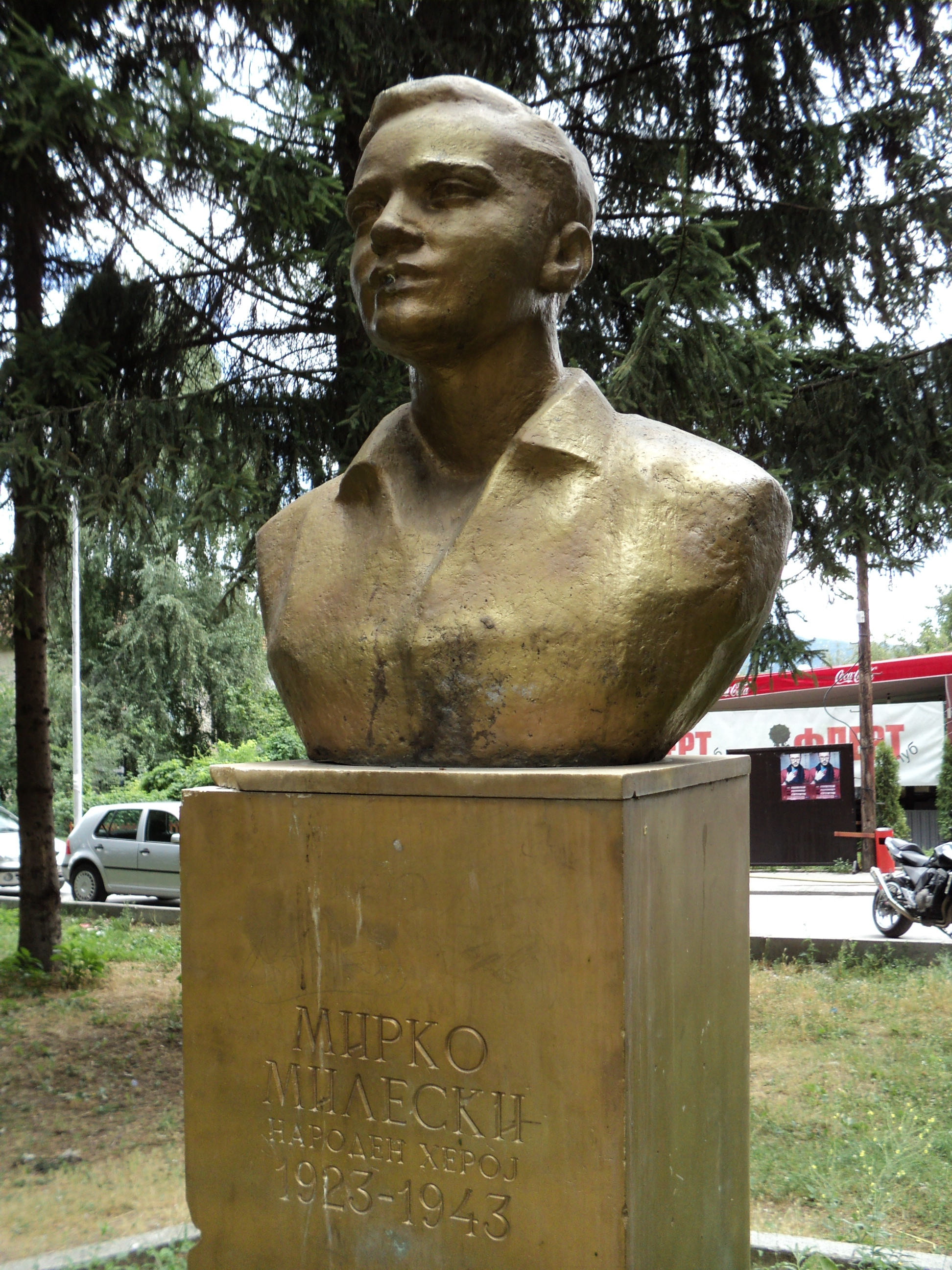 Bista Mirka Milevskog kod srednje škole Mirko Milevski, Kičevo. Self-made. Jul 2011.